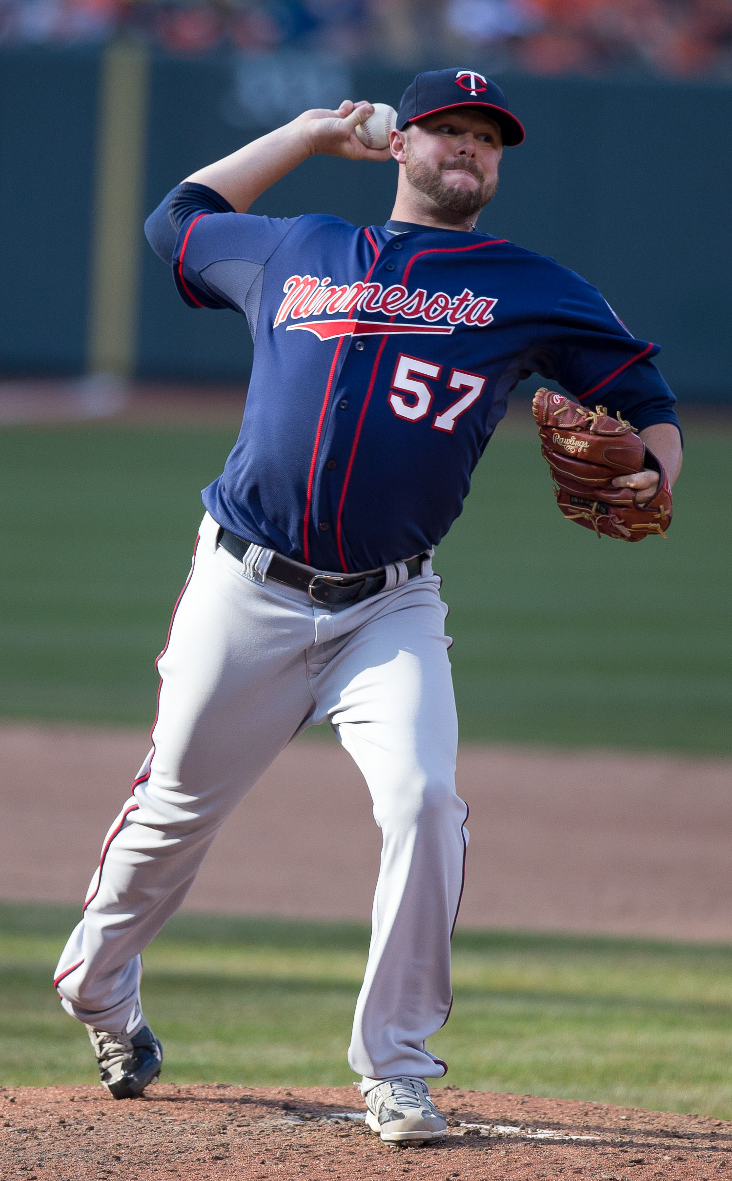 Ryan Pressly